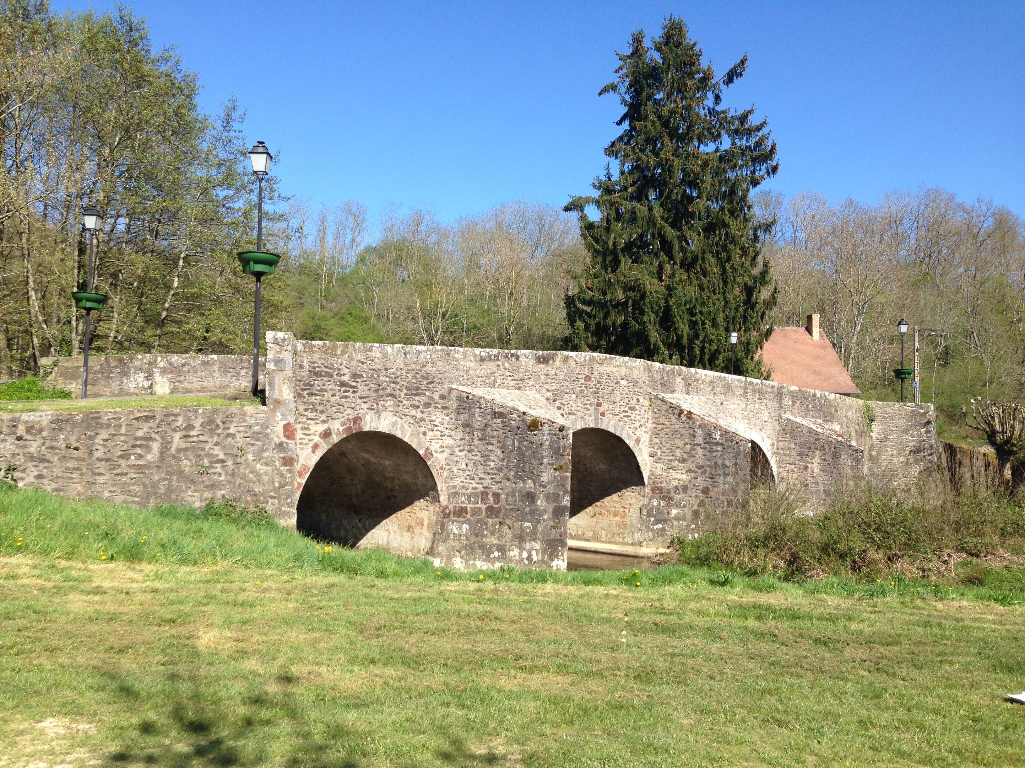 Pont romain Culan